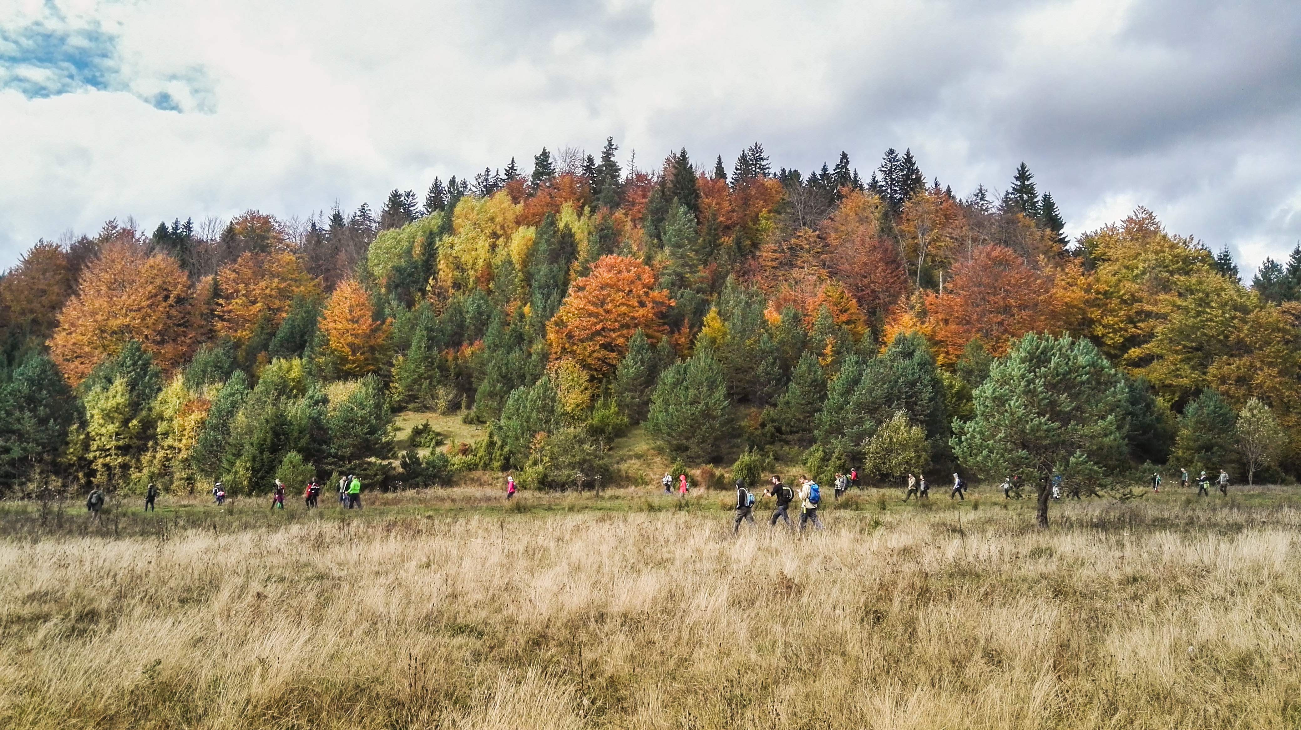 Посебни резерват природе „Лисина", Мркоњић Град ID добра: PRP001